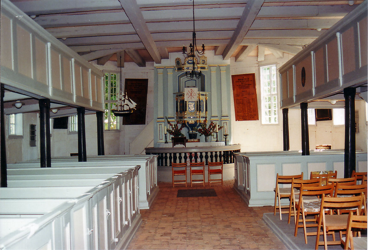 Fachwerkkirche Luckow, Inneres, Blick auf Kanzelaltar